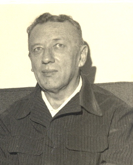 foto de O.Handro